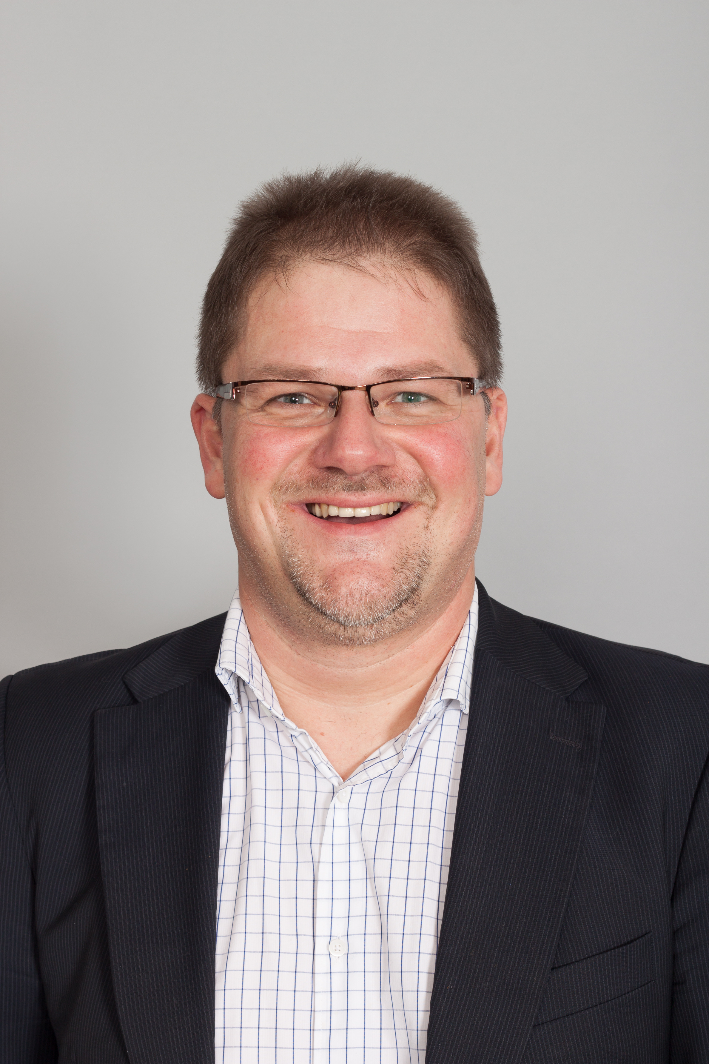 Landtagsabgeordneter Holger Apfel